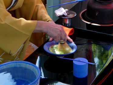 Teezeremonie in Myoko